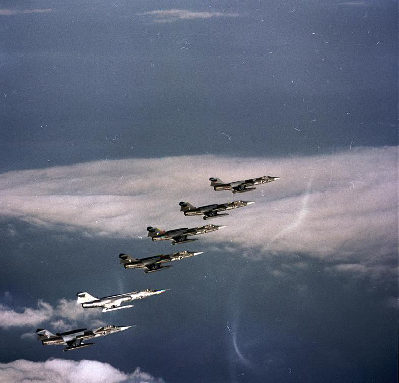 Marinefliegergeschwader 1 M FL. G1 Geschwader Jagel [bei Schleswig] Marine F104G (Starfighter)